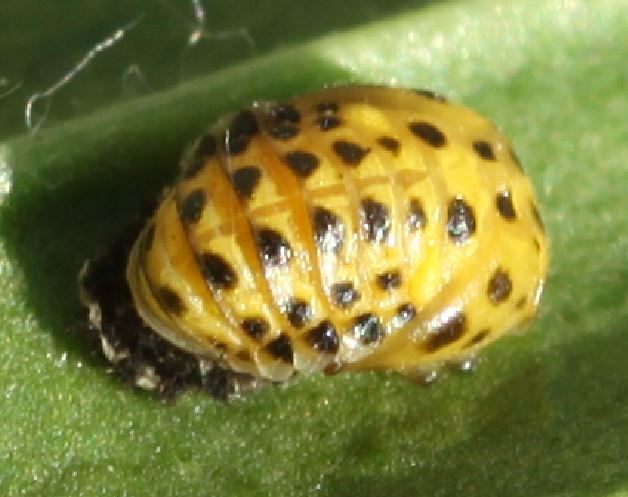 Puppe des Zweiundzwanzigpunkt-Marienkäfers (Psyllobora vigintiduopunctata) auf der Blattunterseite eines Spitzwegerichs am 25. September 2018 in der Schwetzinger Hardt